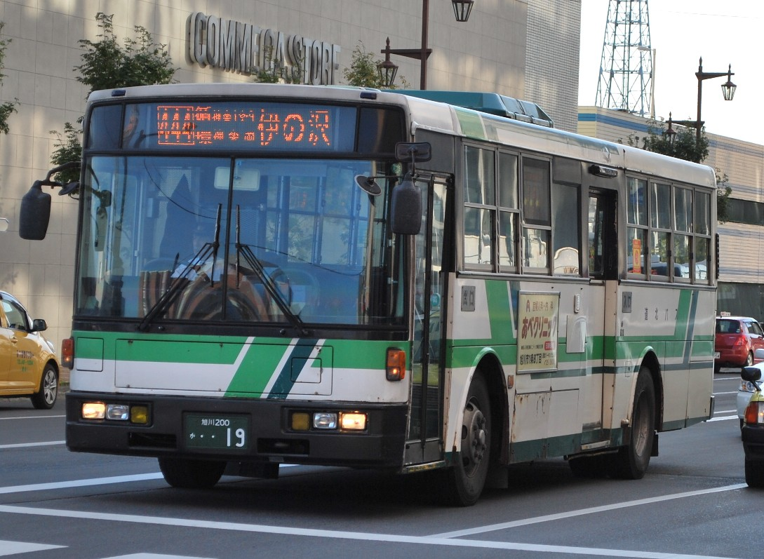 道北バス19号車 北海道旭川市旭川駅近隣の公道上で撮影